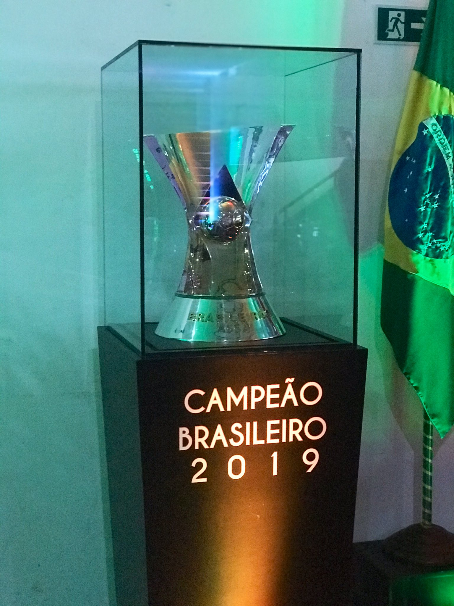 Troféu do Campeonato Brasileiro de 2019 Conquistado pelo CR Flamengo